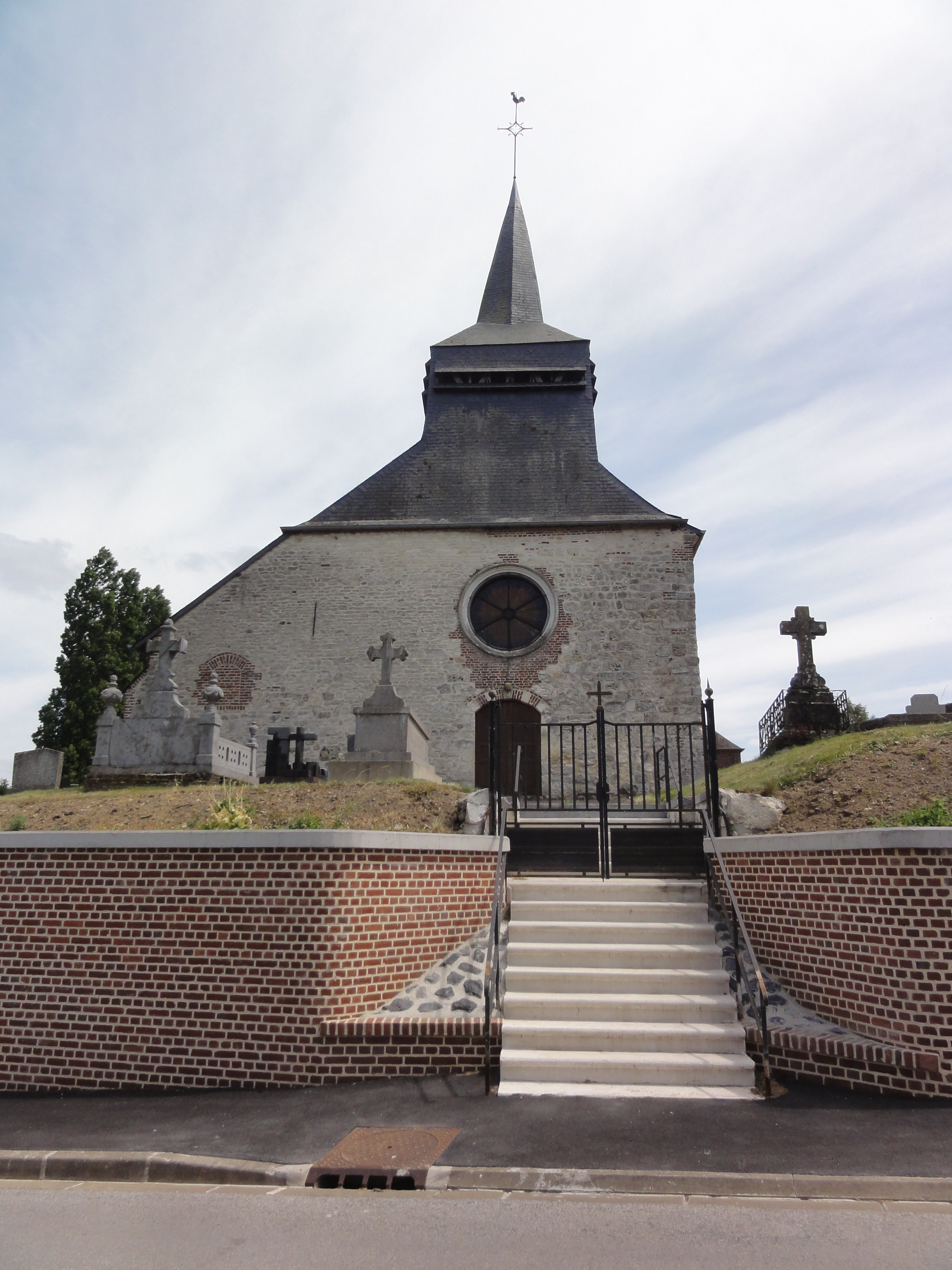 Dagny-Lambercy (Aisne) église, façade entree, escalier devant